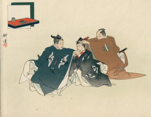 Scene out of Nô-play "Gempuku Soga", by Tsukioka Kōgyo